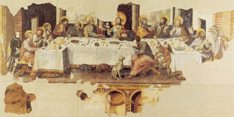 Ultima Cena del Todisco, Marsico Nuovo